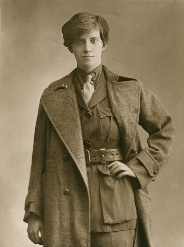 Rotha Beryl Lintorn-Orman, 22 août 1916